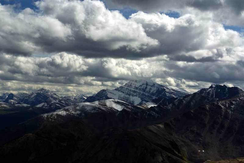 Hory v národním parku Jasper